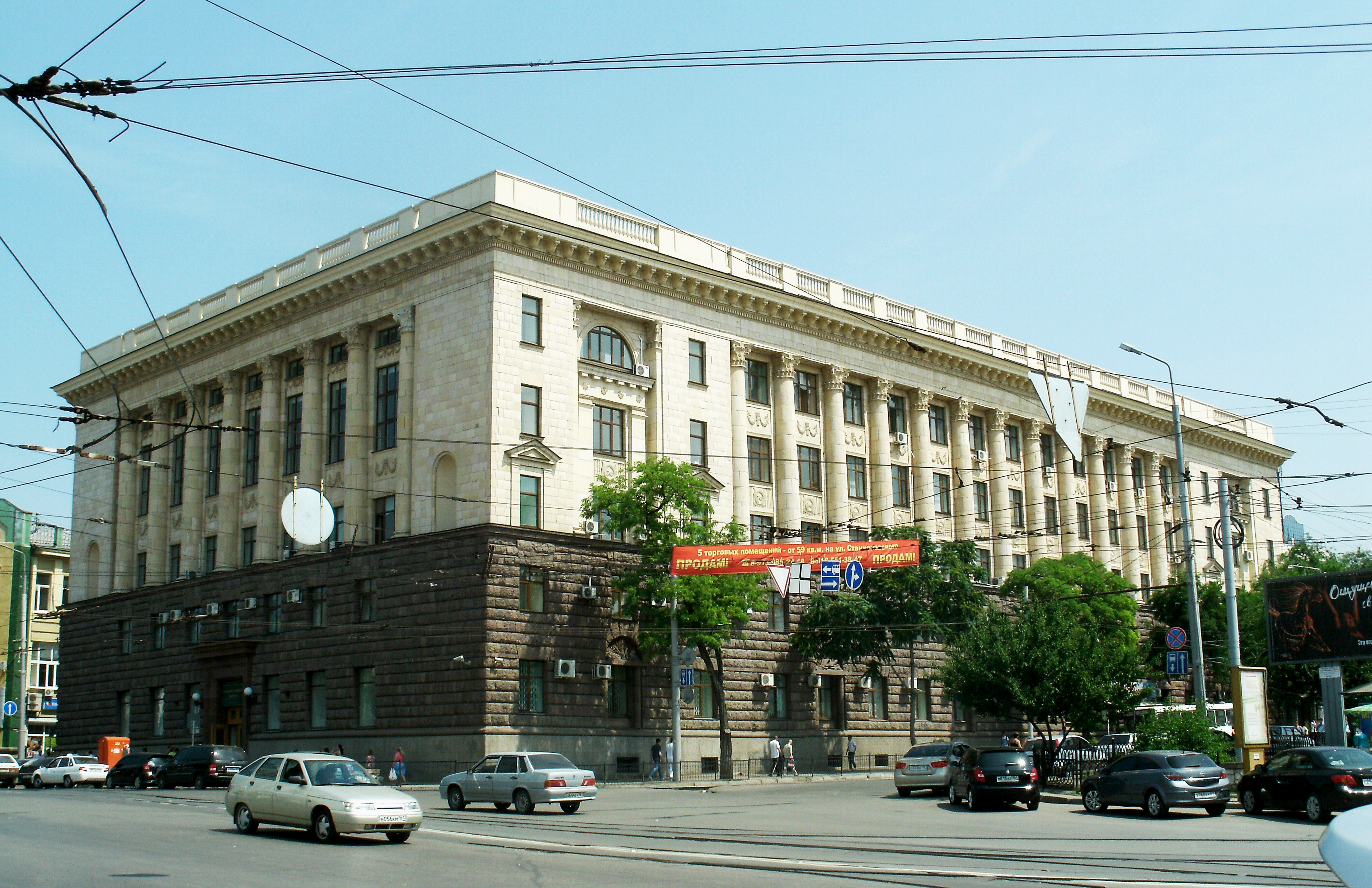 Таможенная академия (бывшая партшкола)